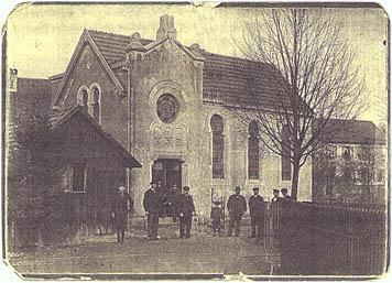 Synagoge in Villé im Elsass